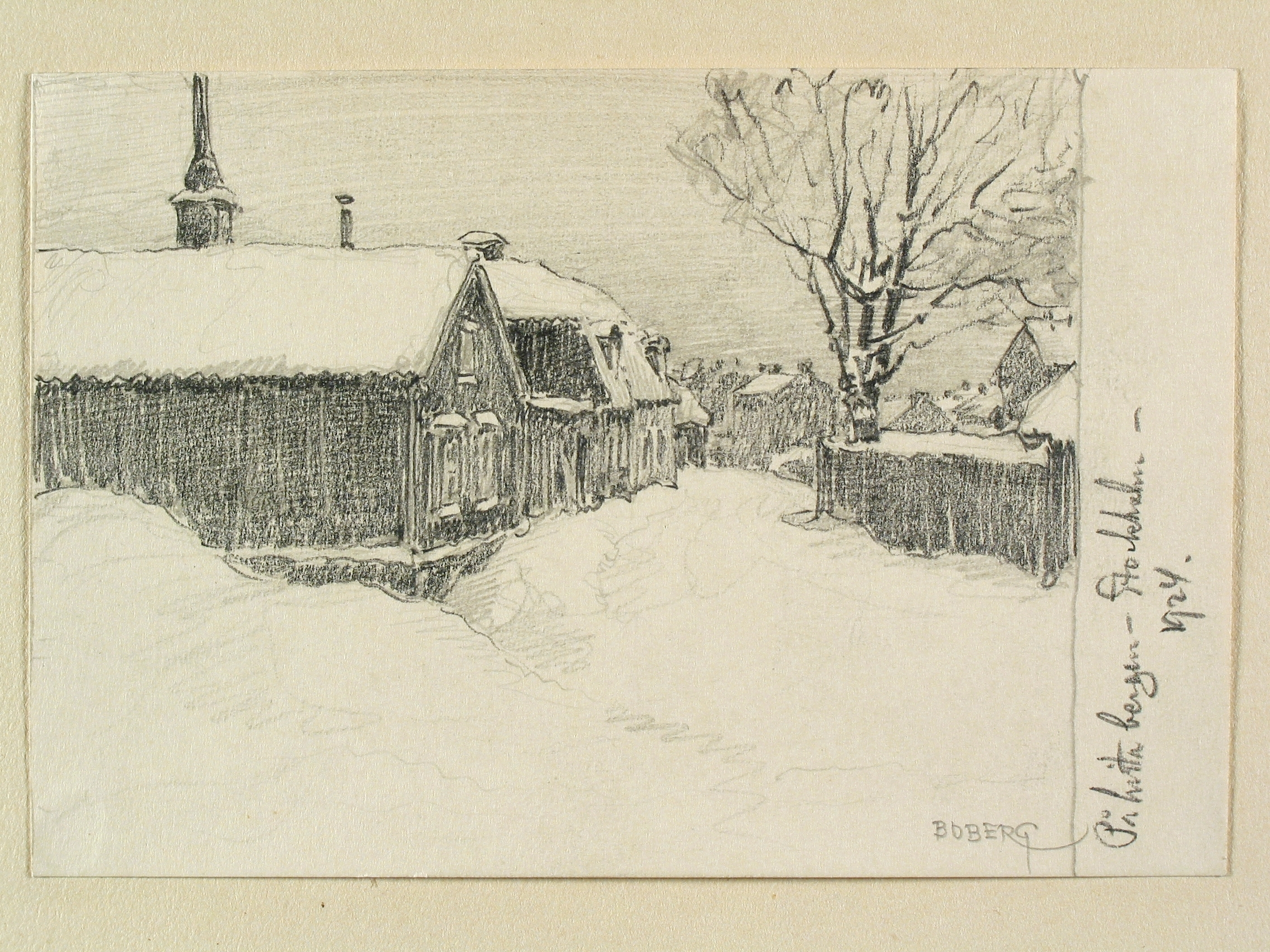 Stockholm, Södermalm, Vita bergen. Teckning av Ferdinand Boberg Depicted place: Söder, Vita bergen (Ortnamn därutöver), Stockholm County (Q104231)